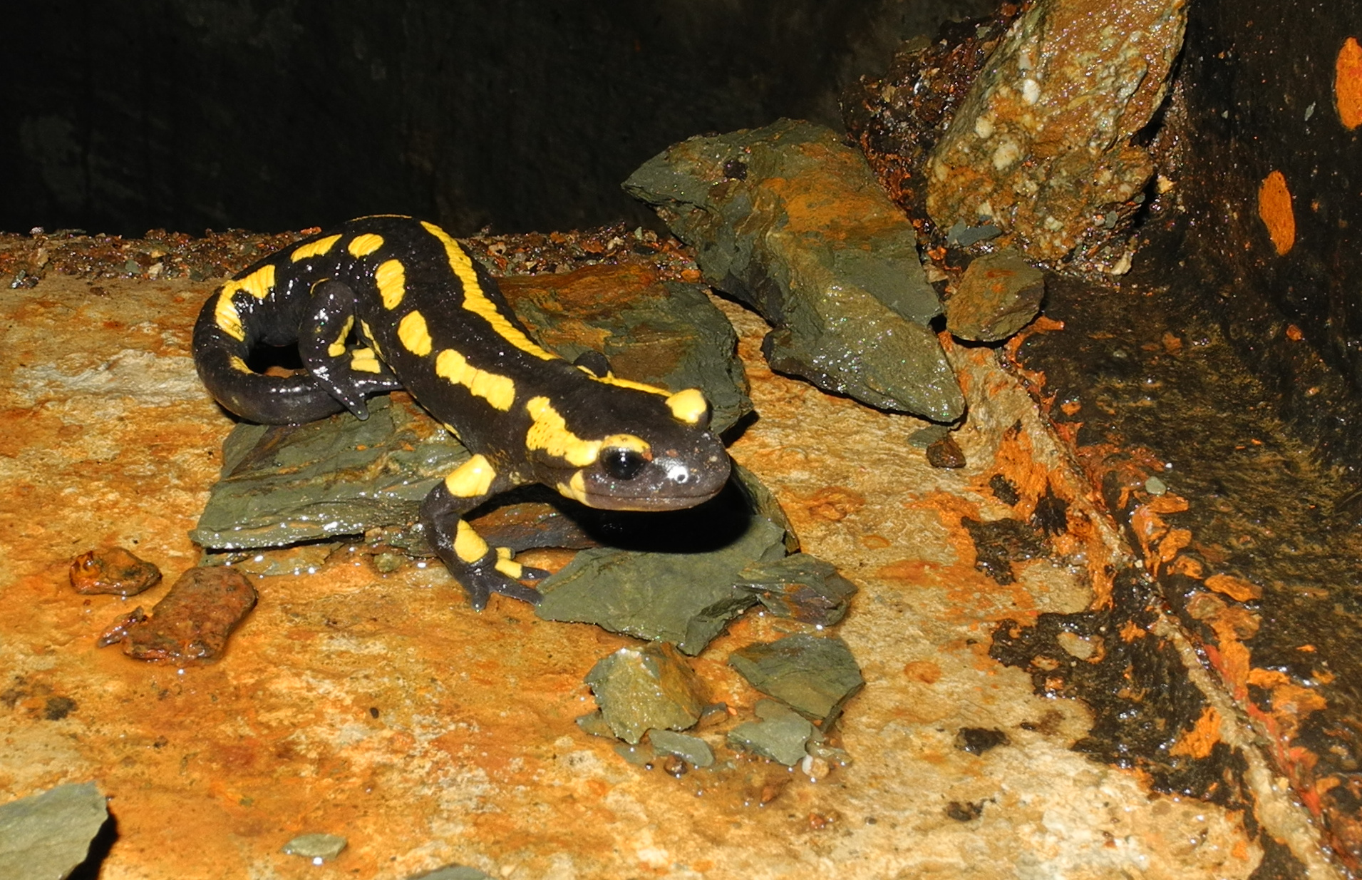 Salamandre, dans l'escalier du puits n°7. Salbert hill fortifications. Old NATO station.